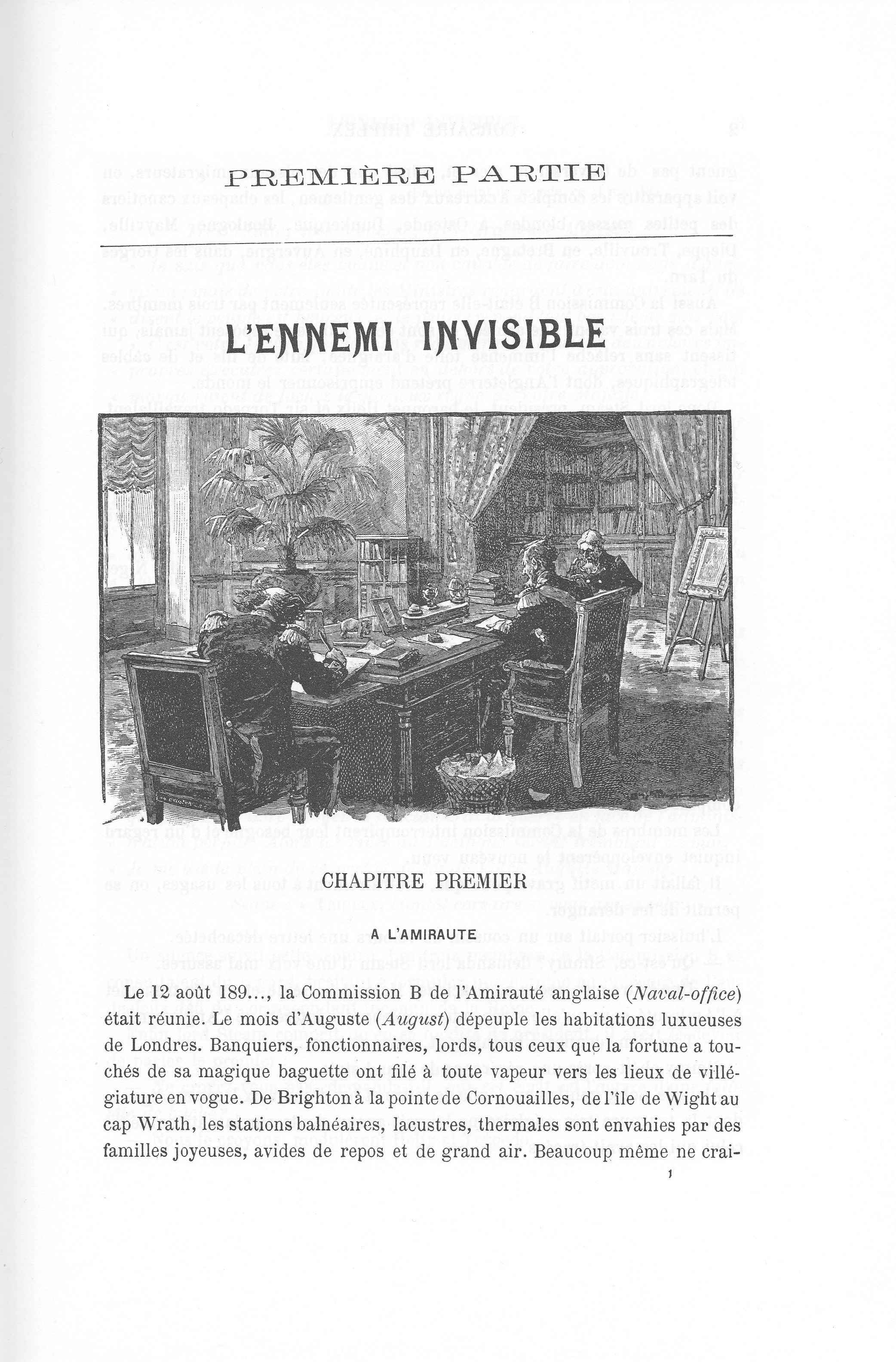 Première page du roman de Paul d'Ivoi "Corsaire Triplex" (1898). La page est illustrée par une gravure d'un dessin de Louis Tinayre.